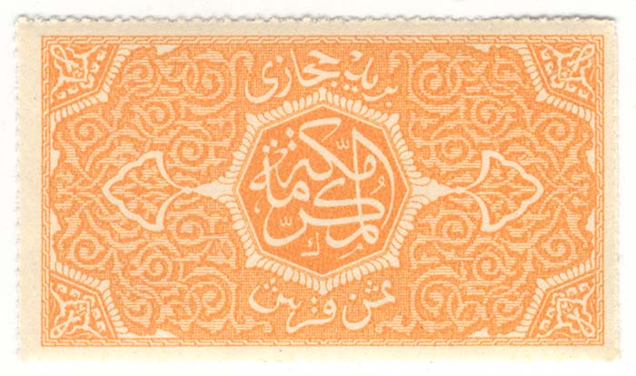 البريد الحجازي